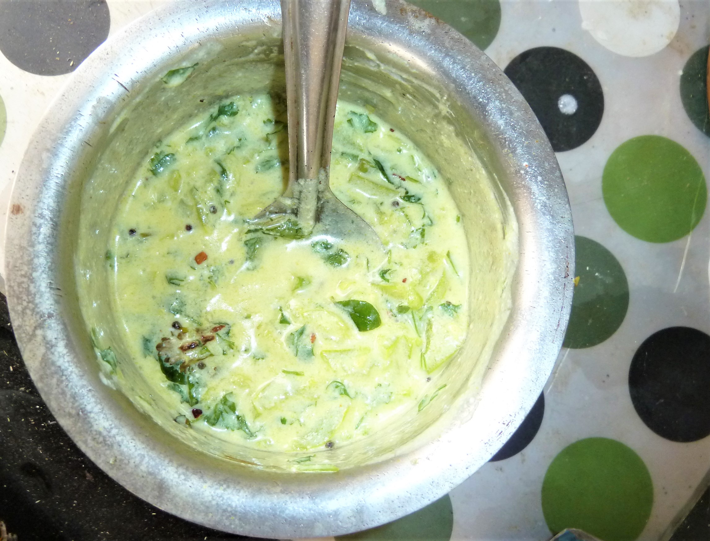 పొట్లకాయ పెరుగు పచ్చడి